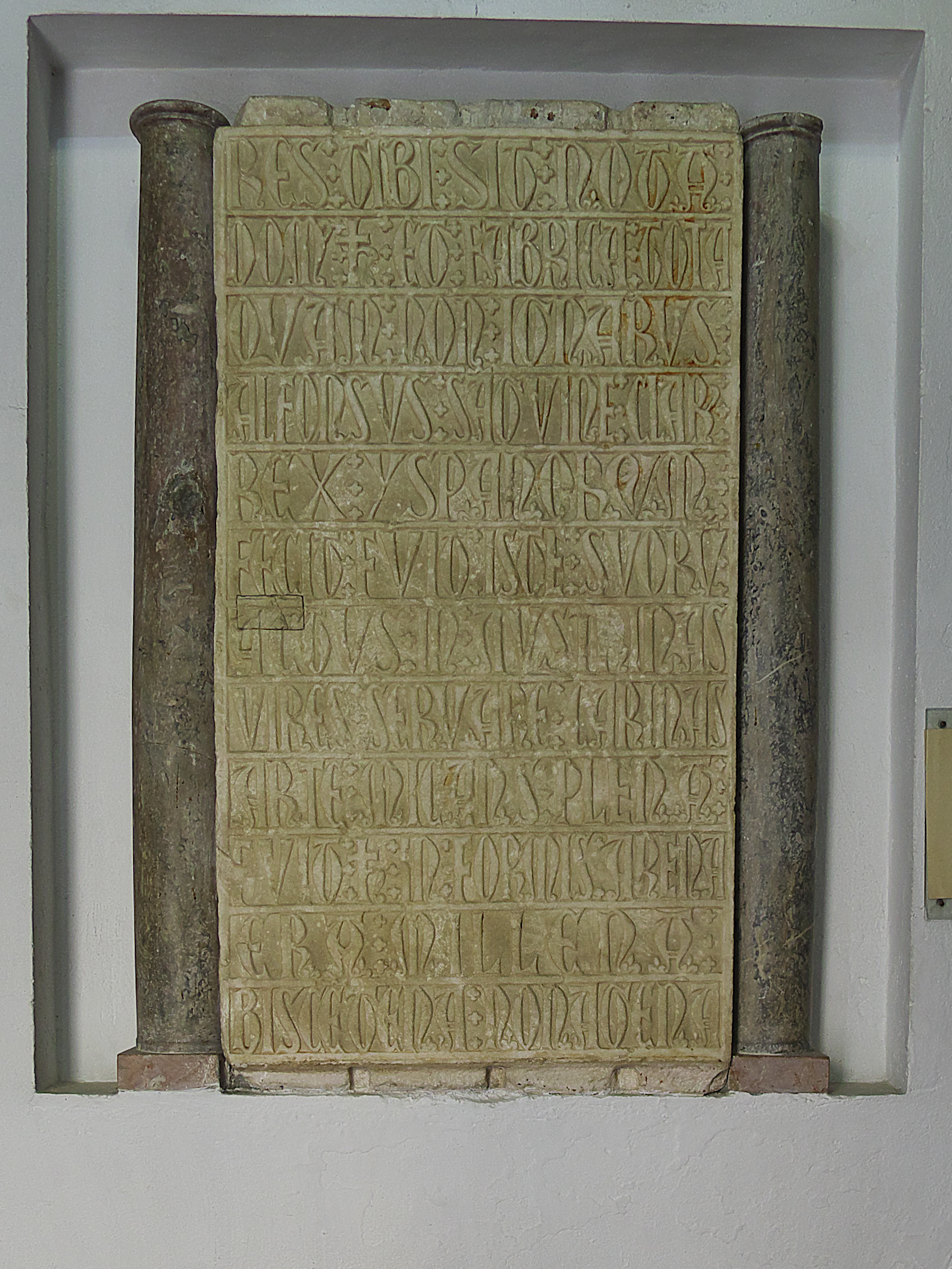 RES TIBI SIT NOTA / DOMUS HAEC ET FABRICA TOTA / QUAM NON IGNARUS / ALFONSUS SANGINE CLARUS / REX ISPANORUM / FECIT FUIT ISTE SUORUM / ACTUS IN AUSTRINAS / VIRES SERVARE CARINAS / ARTE MICANS PLENA / FUIT HAEC IN FORMIS ARENA / ERA MILLENA / BISCENTENA MONAGENA